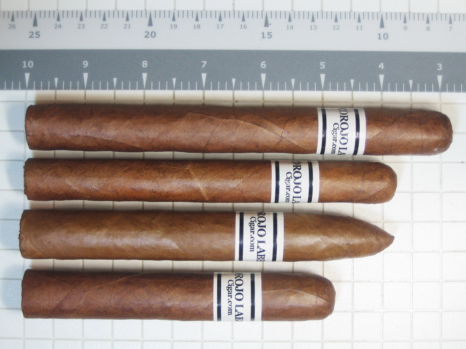 Corojo Label